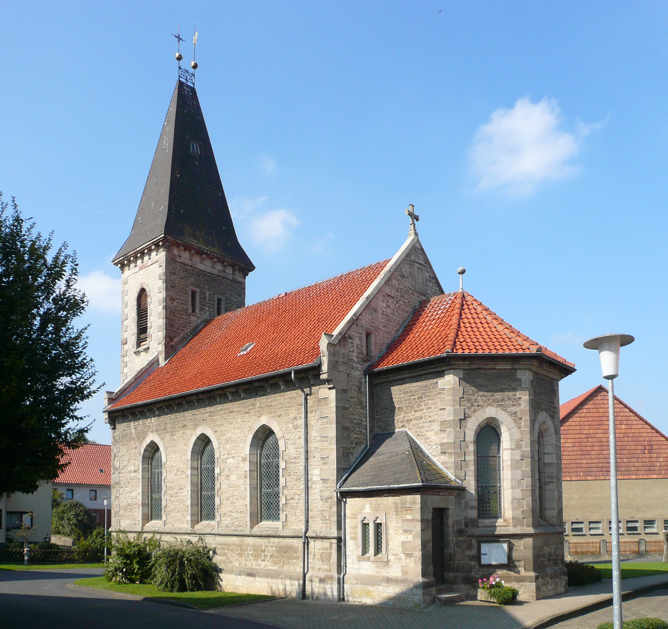 Ev.-luth. Kapelle in Volkerode, Gemeinde Rosdorf, Niedersachsen. Erbaut 1891